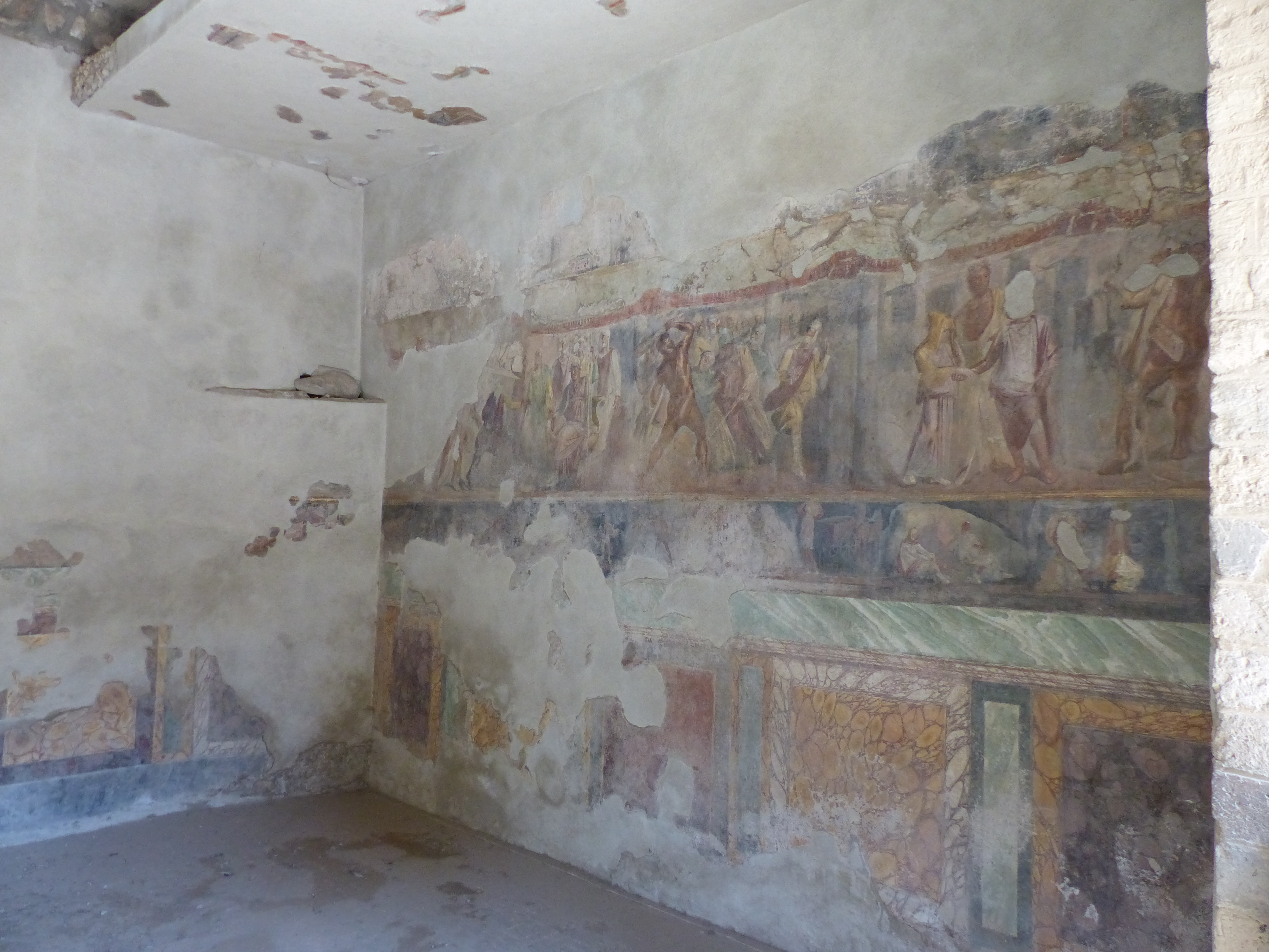 Casa de Ottavio Quartione